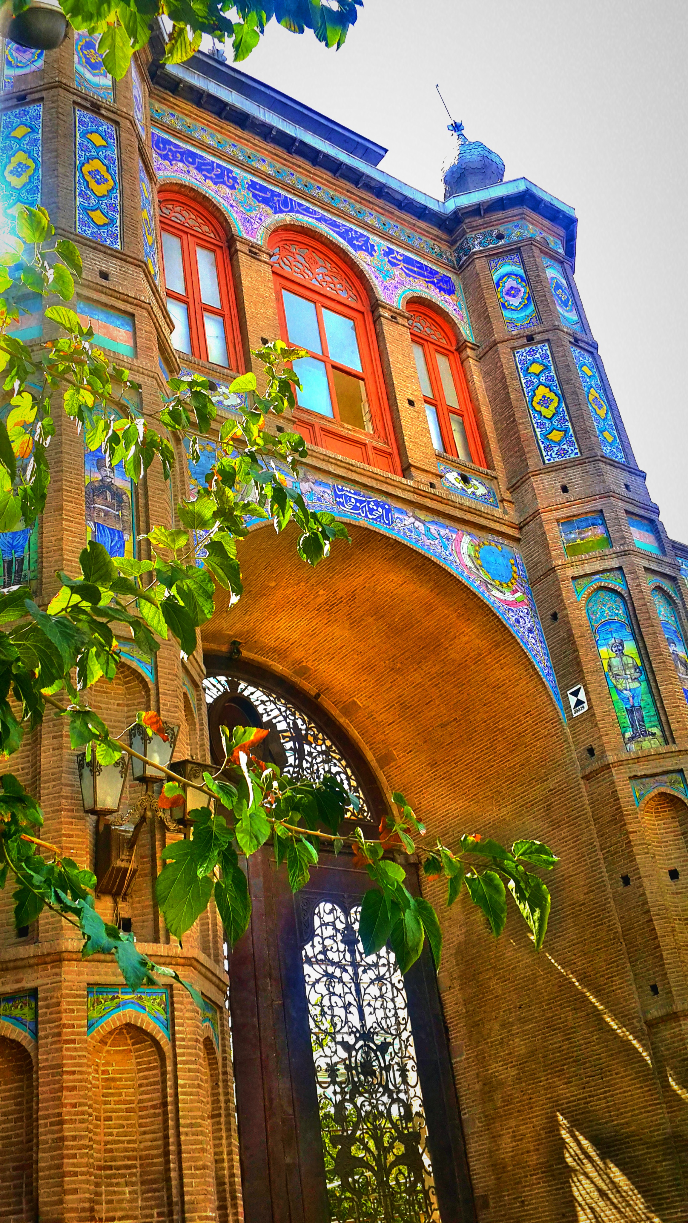 سردر باغ ملی